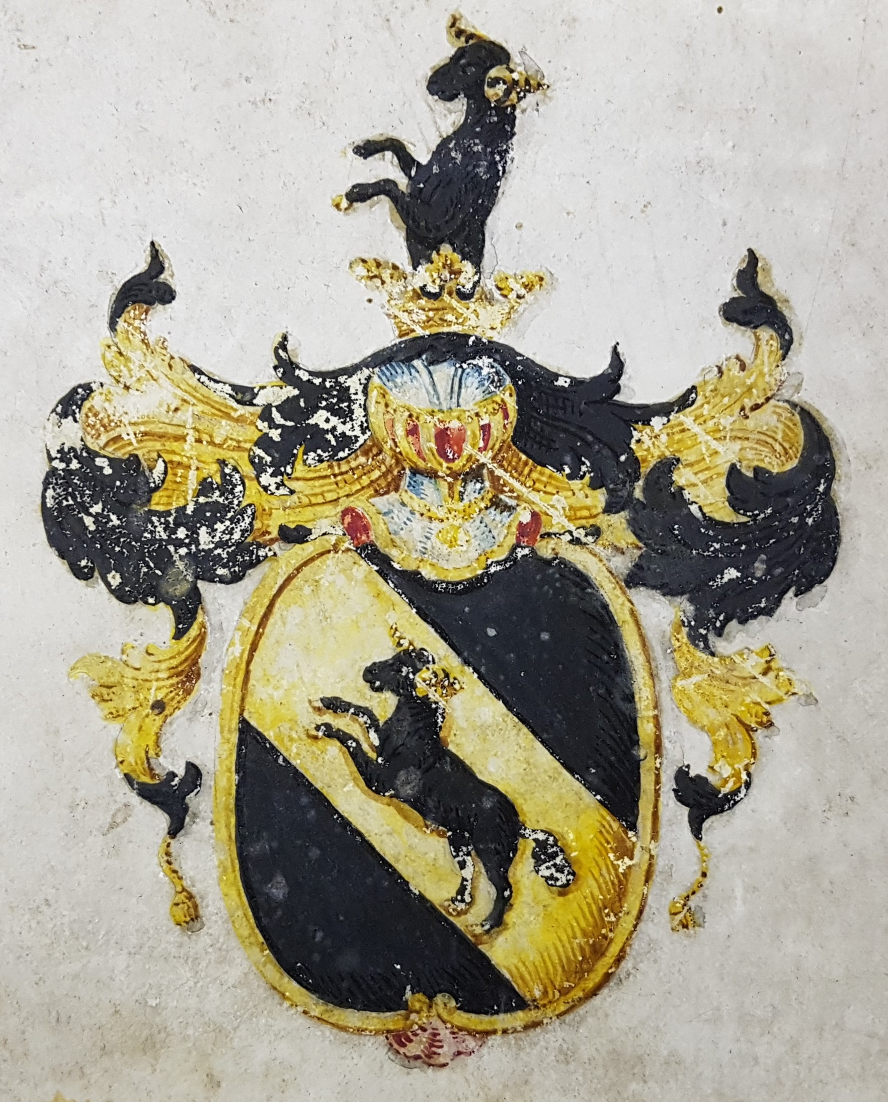 Staatsarchiv Bern, Standesrechnung 1796, Wappen Stettler.